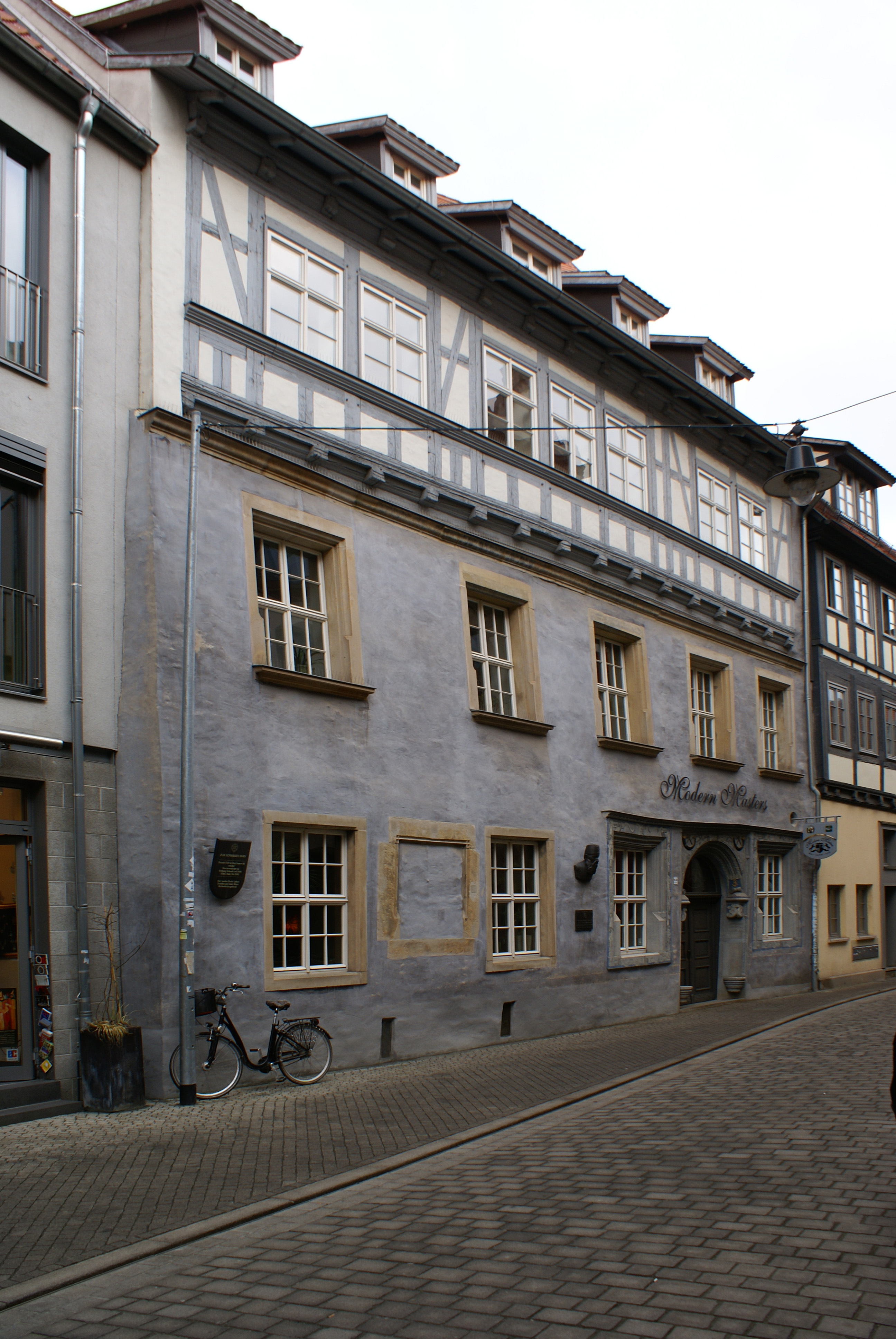 Das Haus "Zum schwarzen Horn" - Michaelisstraße in Erfurt.